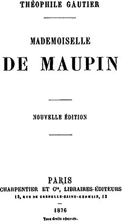 Edición de 1876 de la novela "Mademoiselle de Maupin" —obra de dominio público—.